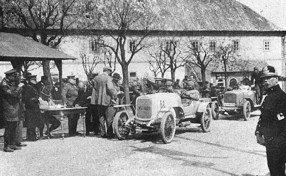 Walter WIZ (1923) Vincenc Desenký při startu na Zbraslavském náměstí